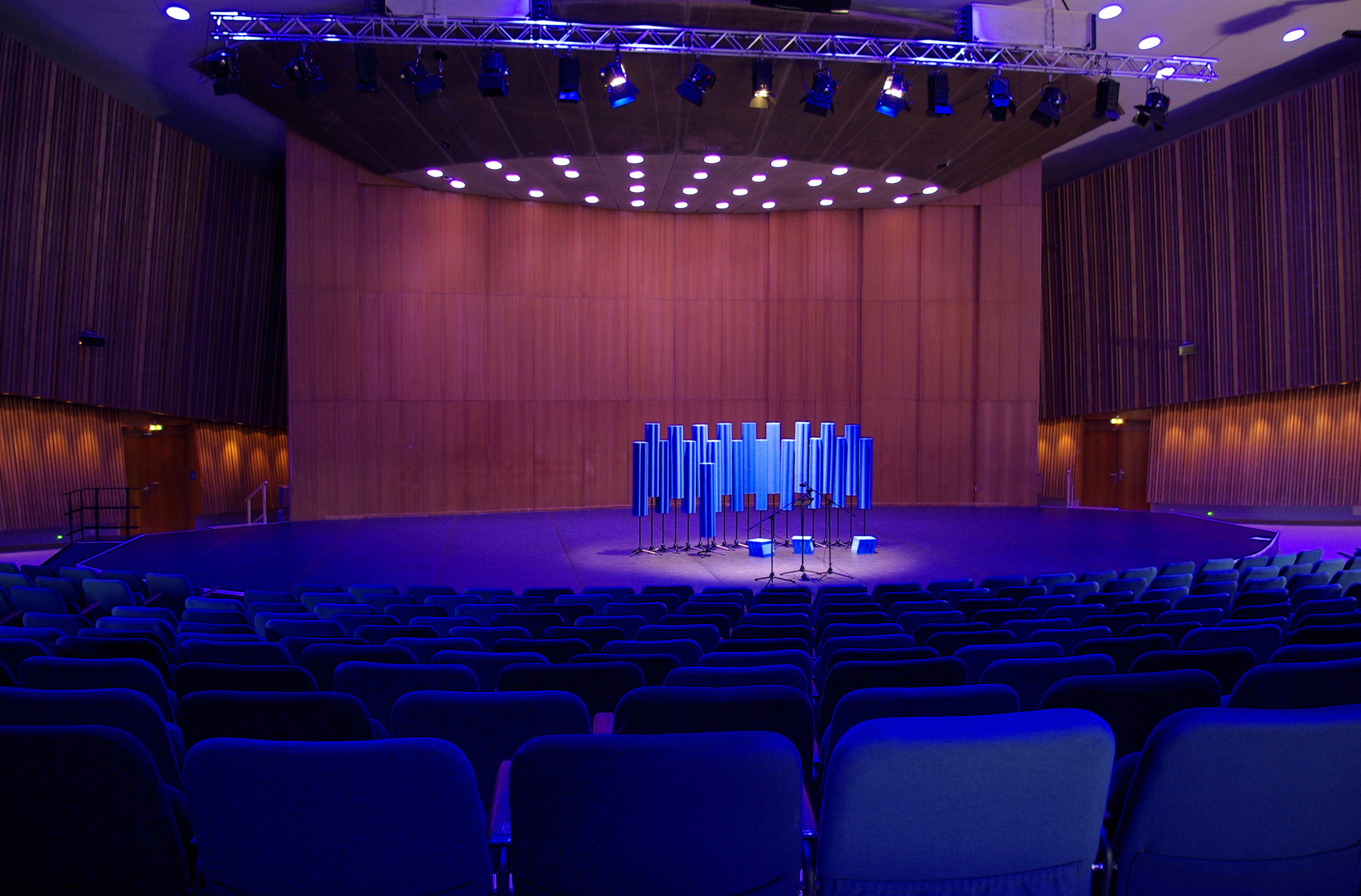 Saal in der Kongresshalle in Berlin